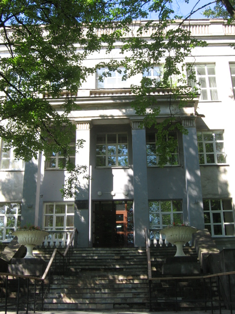 Минск, Республиканский институт профессионального образования